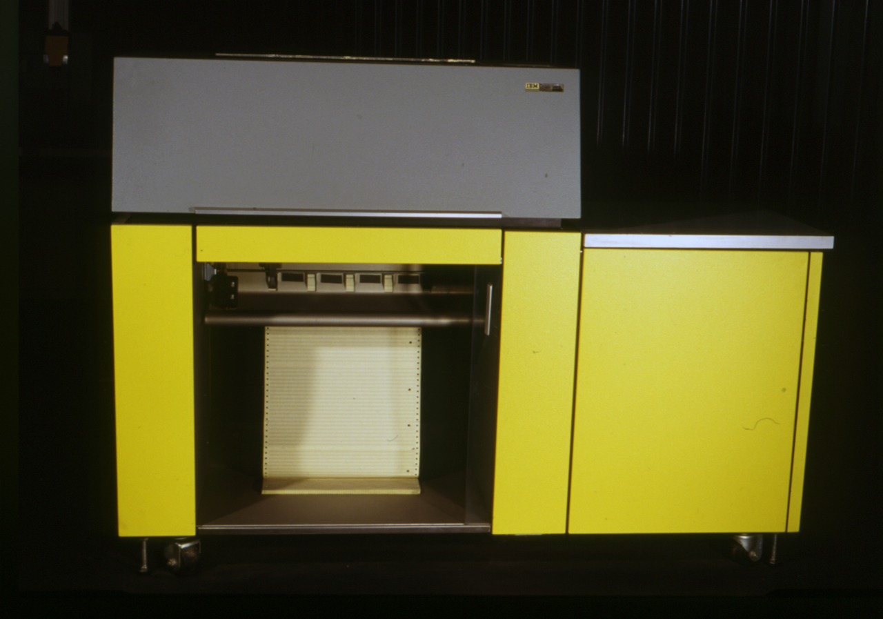 La macchina presenta un corpo stampante poggiato su una base divisa in due parti: la prima è immediatamente sotto al corpo stampante e raccoglie l'output della carta stampata dal corpo superiore; la seconda contiene i connettori e i dispositivi per l'alimentazione e la gestione del corpo stampante. Sotto la base, ai quattro lati sono fissate quattro ruote Caratteristiche tecnicheVelocità di stampa: da 100 a 200 lpm (linee al minuto) Set di caratteri di stampa: catena di stampa a 48 caratteri Funzione Serviva a stampare i dati in uscita dall'elaboratore. Notizie storico-critiche Nel 1969 IBM immette sul mercato per le piccole e medie aziende il Sistema 3 (IBM 5410) che non è compatibile con il già diffuso IBM 360 (del 1964) per una diversa struttura delle schede perforate. Nuove versioni del sistema 3 vengono immesse sul mercato nel 1970 (IBM 5406) e nel 1973 (IBM 5415); tale sistema resta sul mercato fino al 1985 nonostante nel 1978 l'IBM produca il Sistema 38 l Sistema 3 è un elaboratore che utilizza ancora input a schede perforate, ma di un nuovo tipo a 96 colonne e molto più piccole delle precedenti. Il lettore di cui l'S/3 è fornito usa fibre ottiche per la lettura delle piccole perforazioni epuò operare anche con unità nastro e con unità a dischi removibili. La famiglia dei sistemi S/3 non durò molto sul mercato e fu presto soppiantata da nuovi sistemi che risolvevano il problema della multiutenza online Il sistema 3 originale è costituito da diverse parti, tra le quali il sistema centrale 5410, la stampante in linea 5203, la selezionatrice 5486, la perforatrice / lettore / selezionatore di schede perforate 5424, l'interfaccia di acquisizione dati 5496, le tastiere 5471 e 5475.